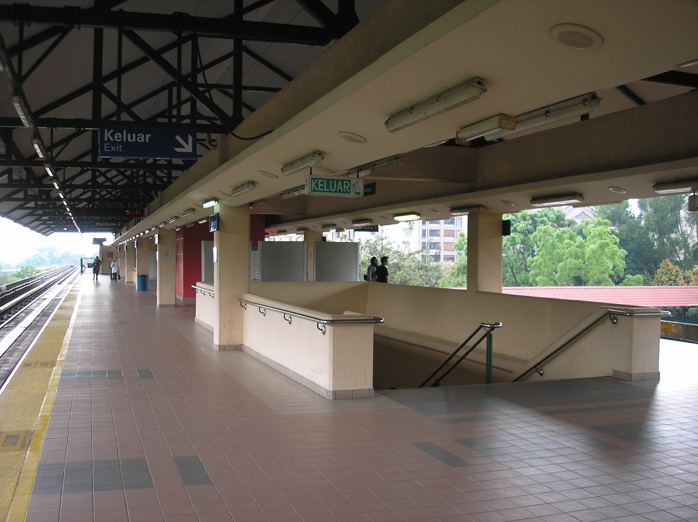 The Setiawangsa LRT station (Kelana Jaya Line), Kuala Lumpur, Malaysia.